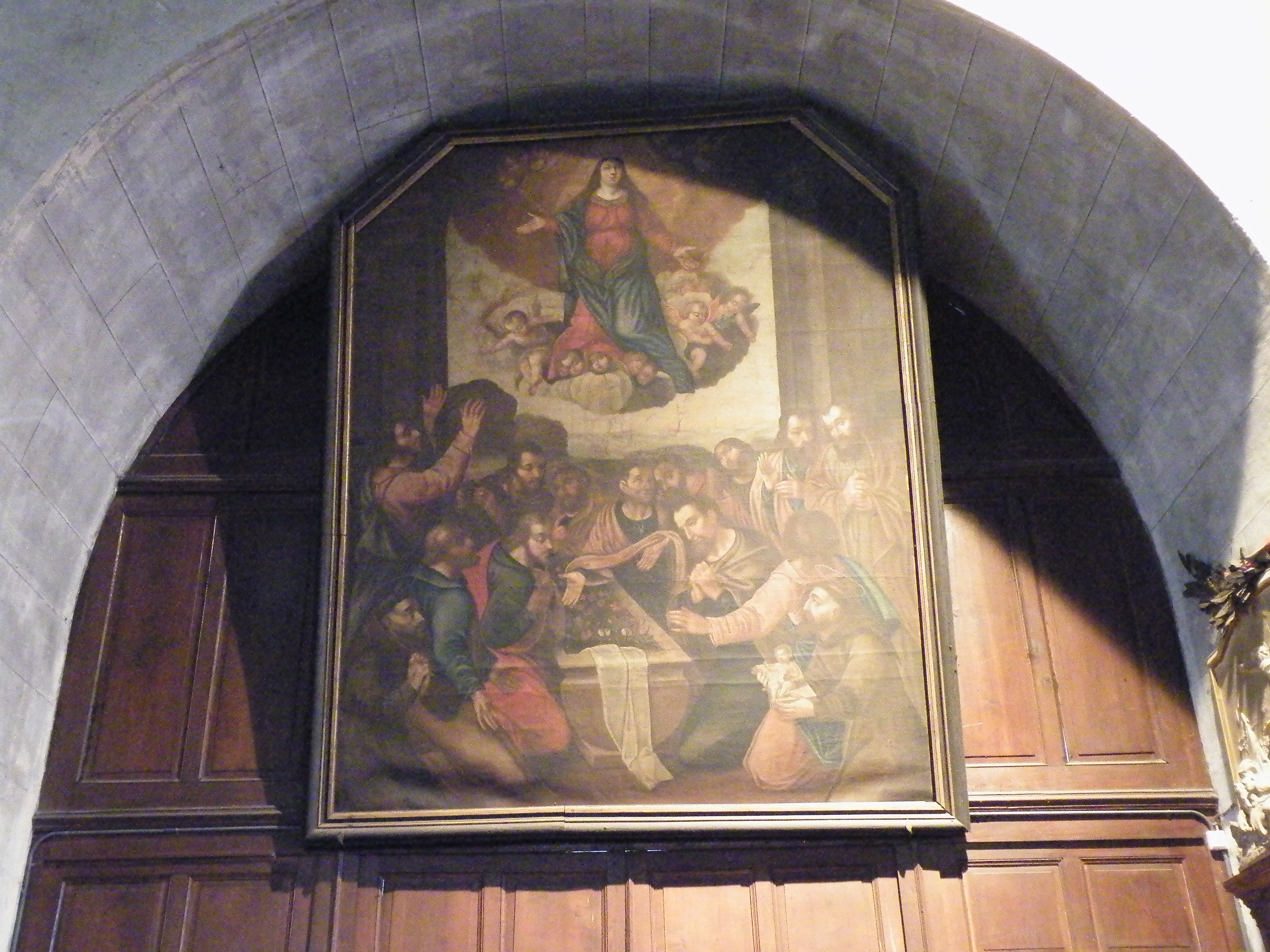 l' Assomption de la Vierge, de Dominique Prot, 1661.